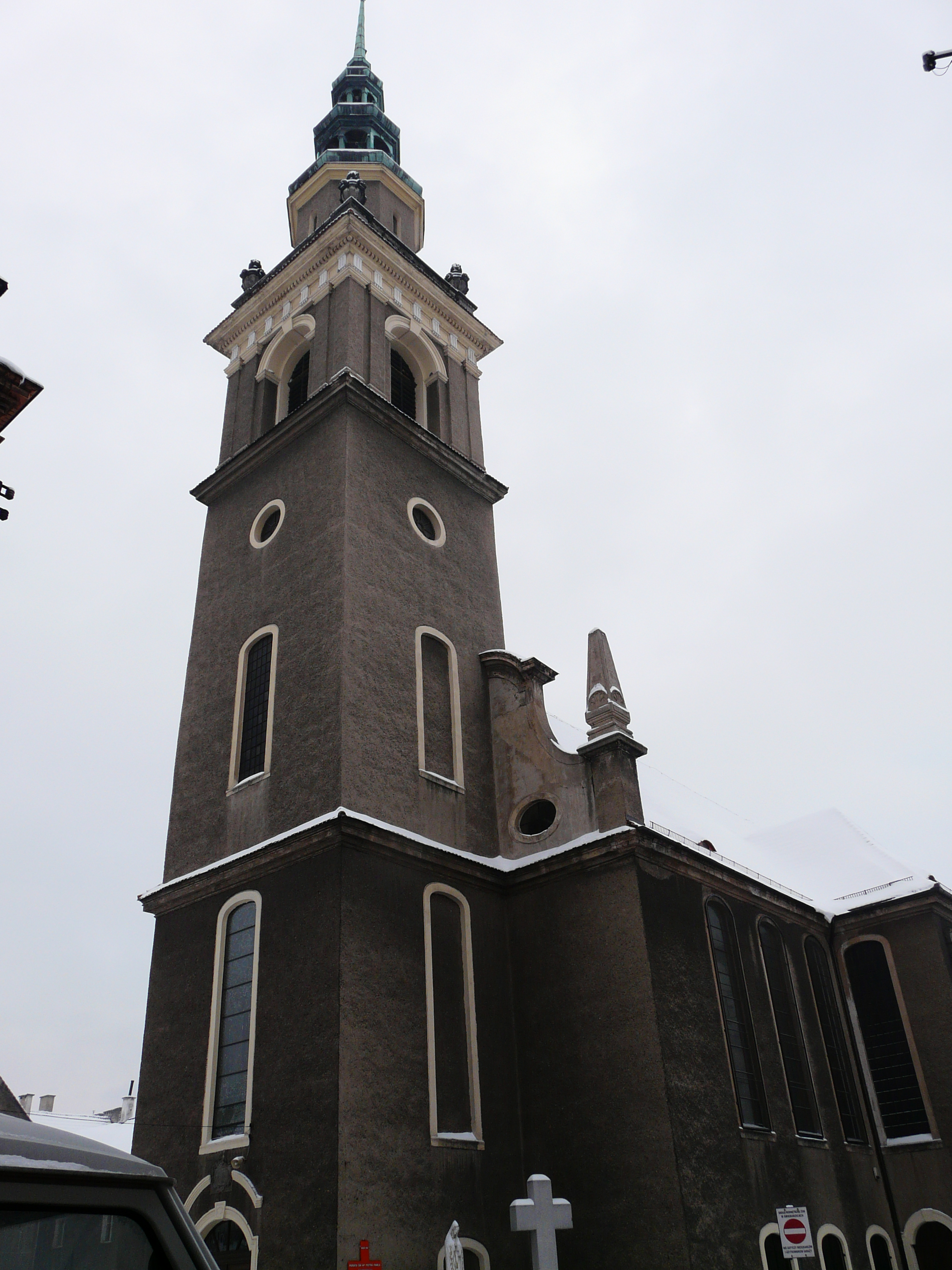 Świebodzice kościół Świętych Apostołów Piotra i Pawła